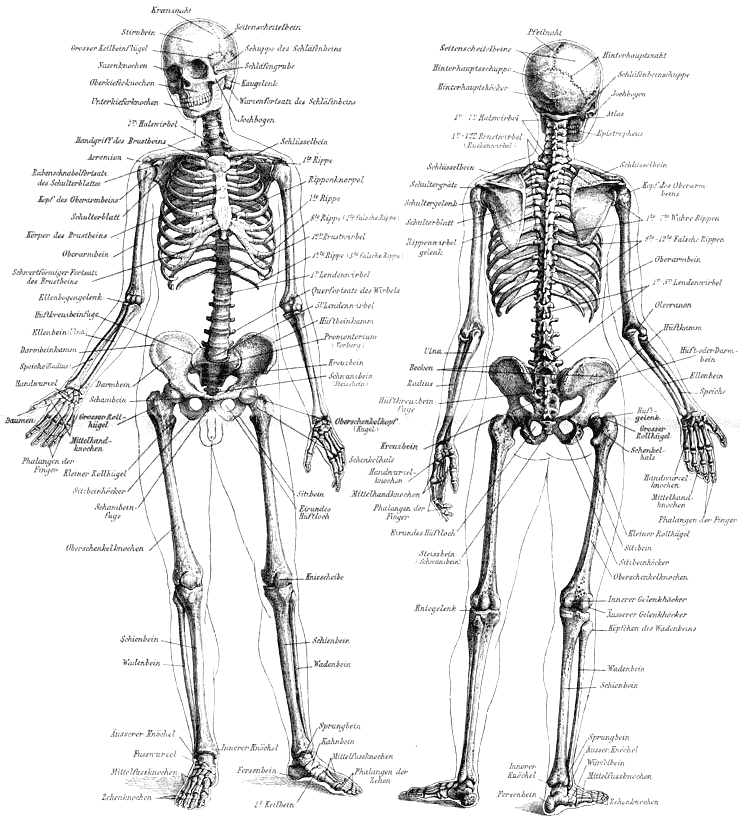 Abbildung aus Meyers Konversationslexikon 1888 - Skelett des Menschen